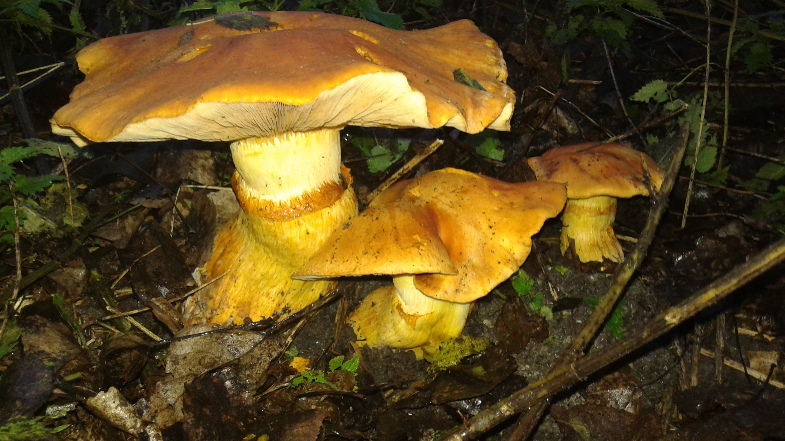 Pholiote remarquable - Pholiota spectabilis ou Gymnopilus junonios photo avec flach